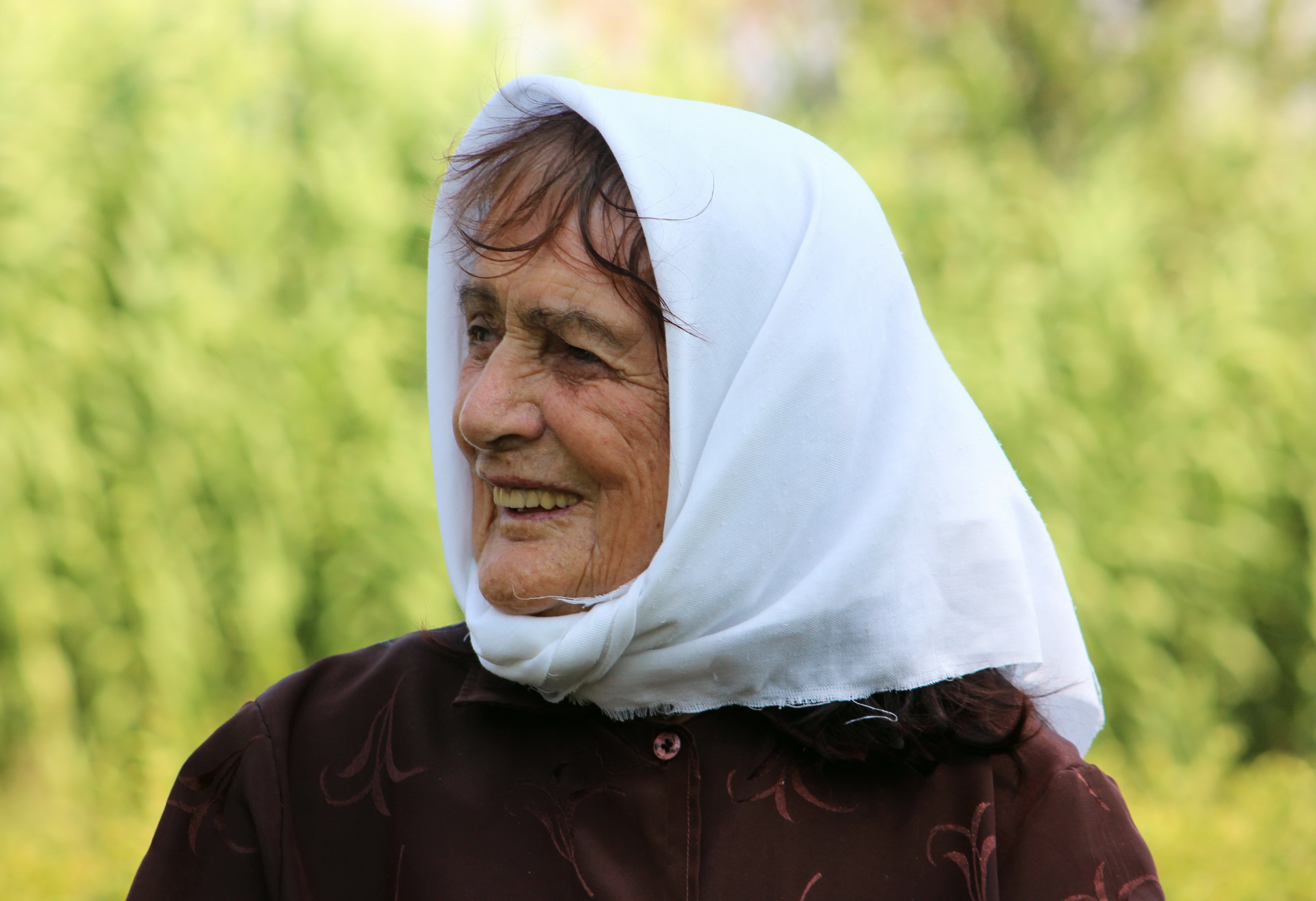 94-jährige Frau aus Albanien